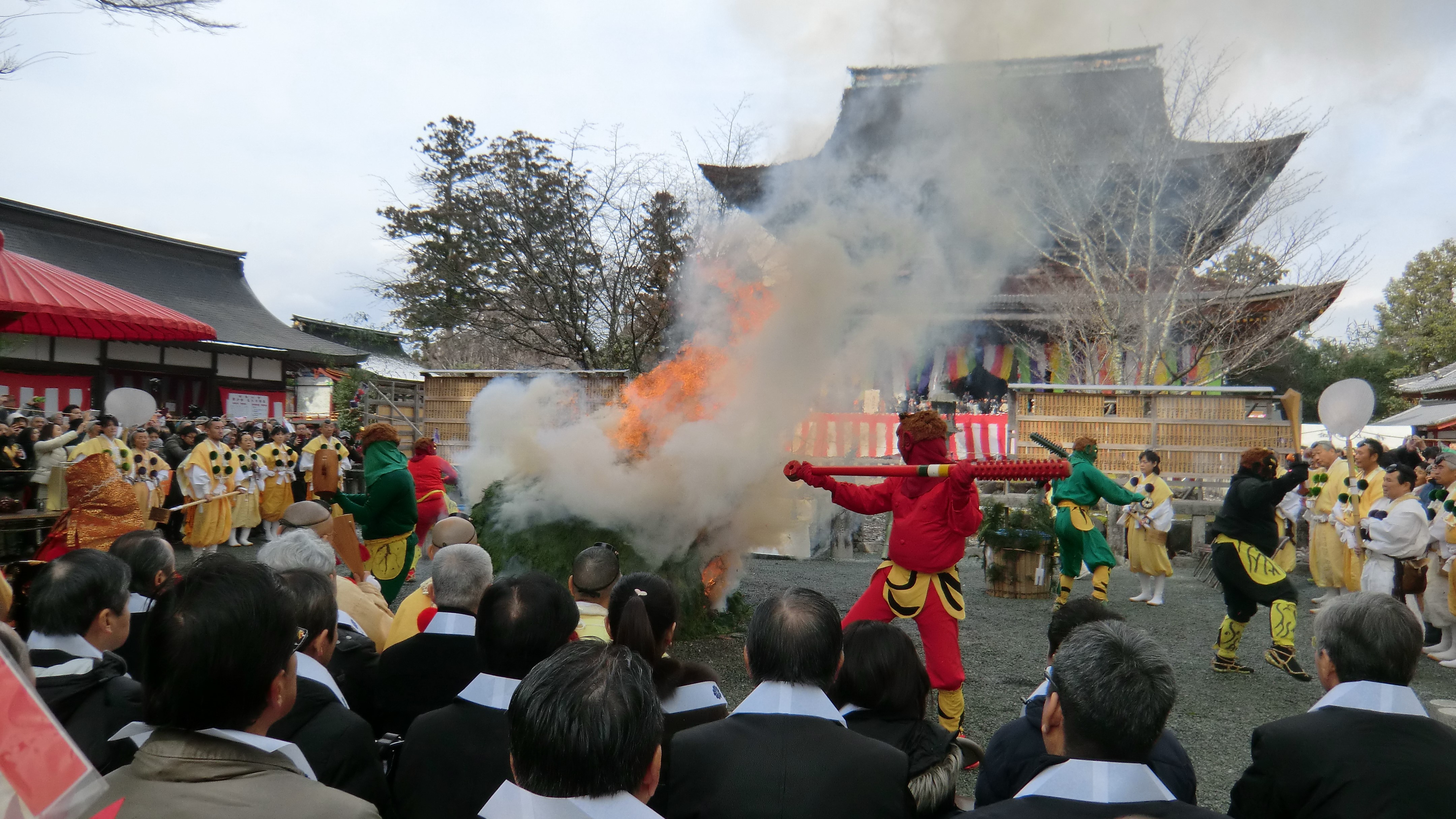 金峯山寺節分会 大護摩供 (2018年2月3日)